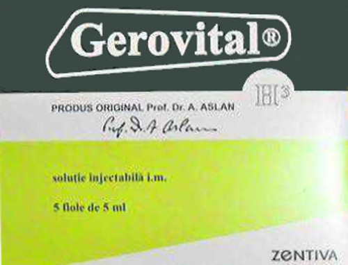 Empaque original del Gerovital de la Dra. Aslan